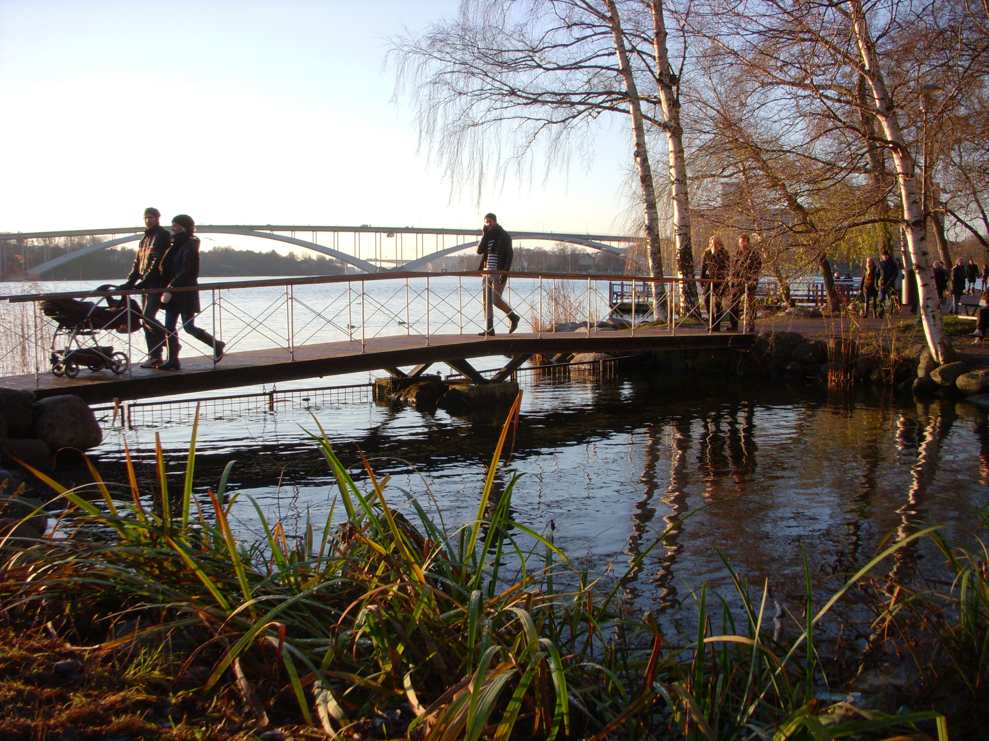 Norr Mälarastrands park, Stockholm, i bakgrunden syns Västerbron